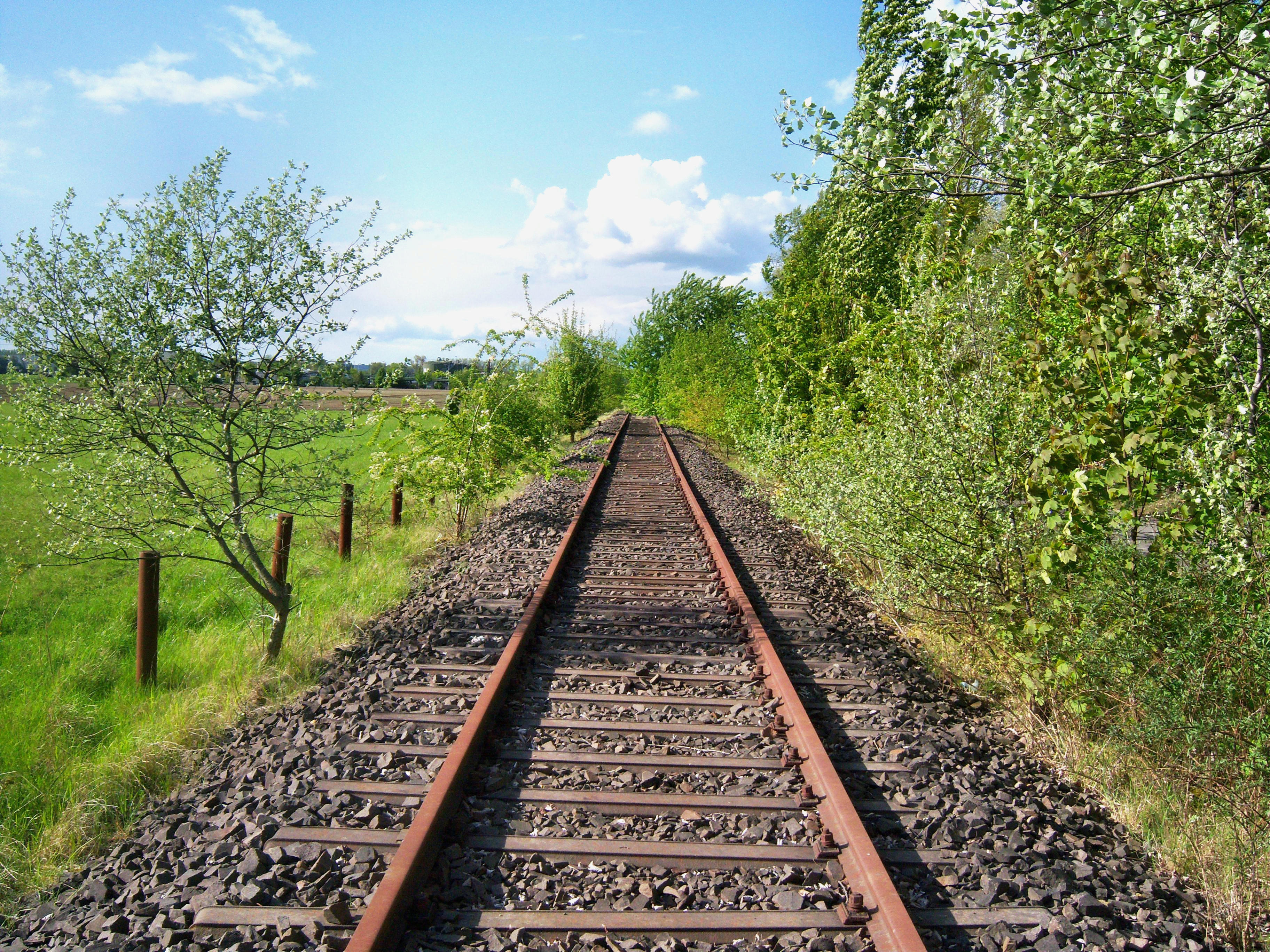 Gleise der alten Altrheinbahn kurz vor Eich (Rheinhessen)